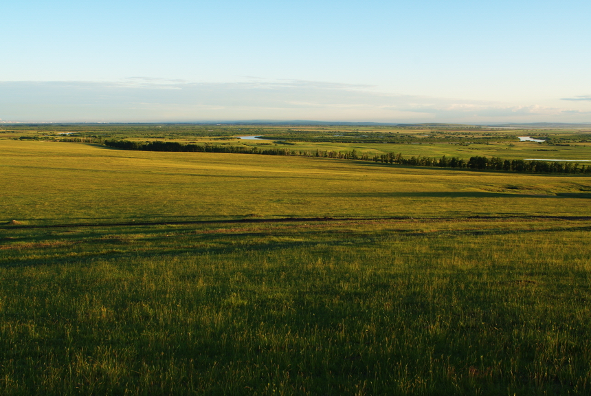 呼伦贝尔 哈克